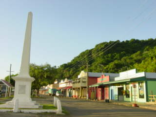 Mémorial de guerre à Levuka, Fidji